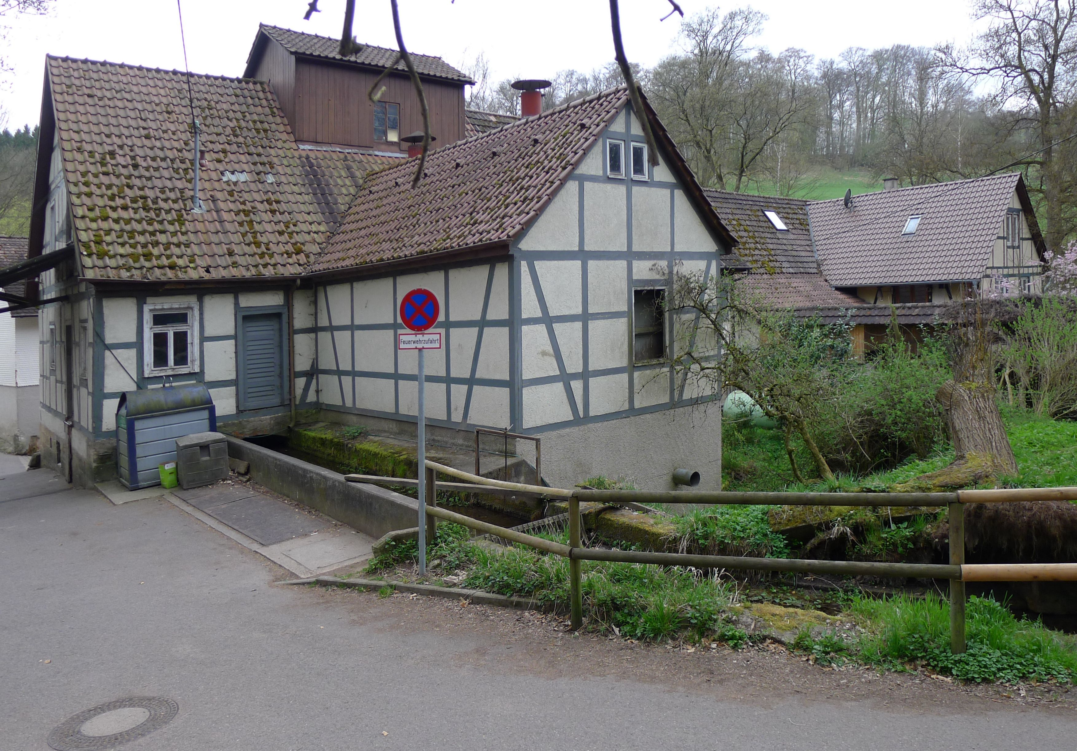 De achterzijde van de Eselsmühle met het voedende waterkanaal